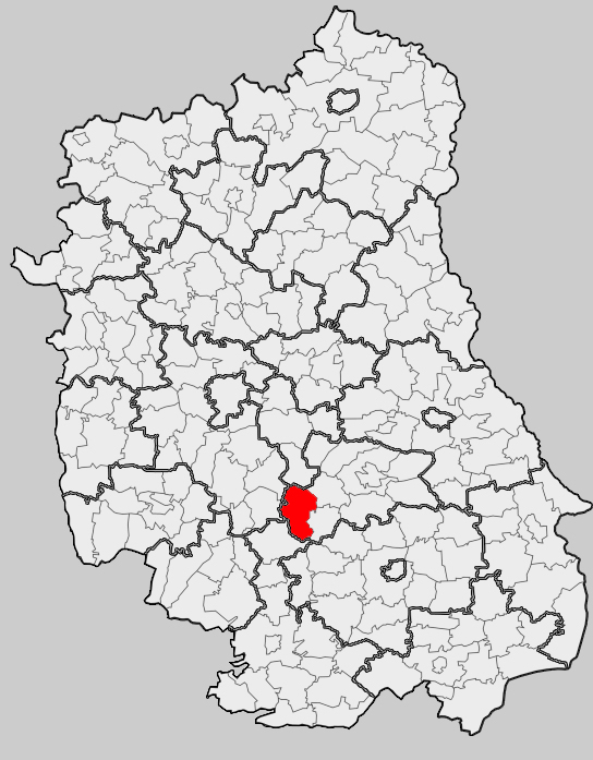 Map of gmina Żółkiewka, Krasnystaw county, Lublin voivodship Mapa gminy Żółkiewka, powiat krasnostawski, województwo lubelskie